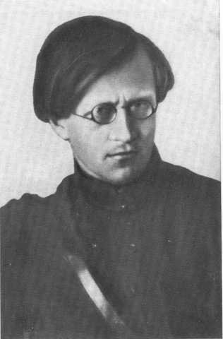 Антонов-Овсеенко, Владимир Александрович